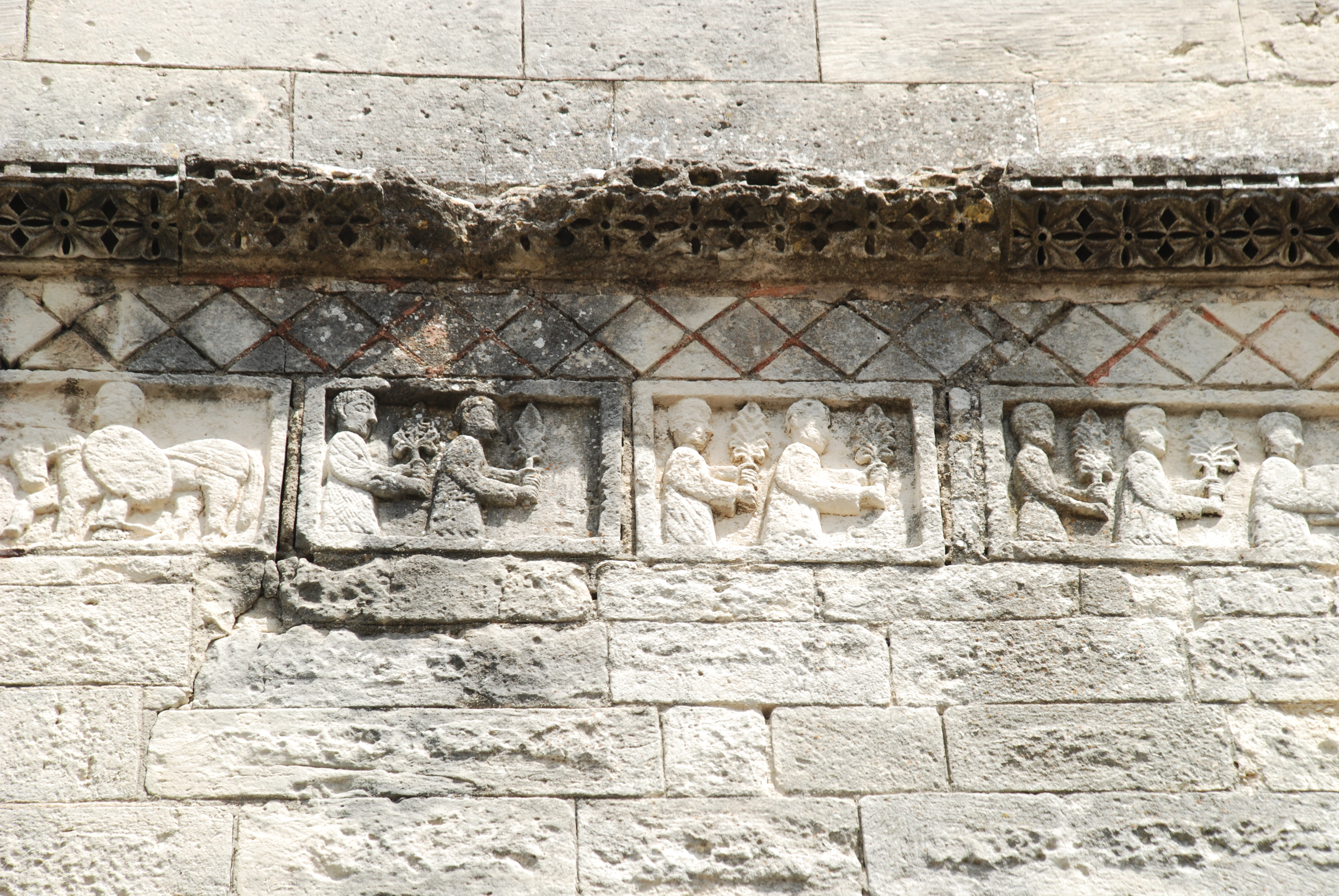 France - Drôme - Tour funéraire de Saint-Restitut - Frise romane